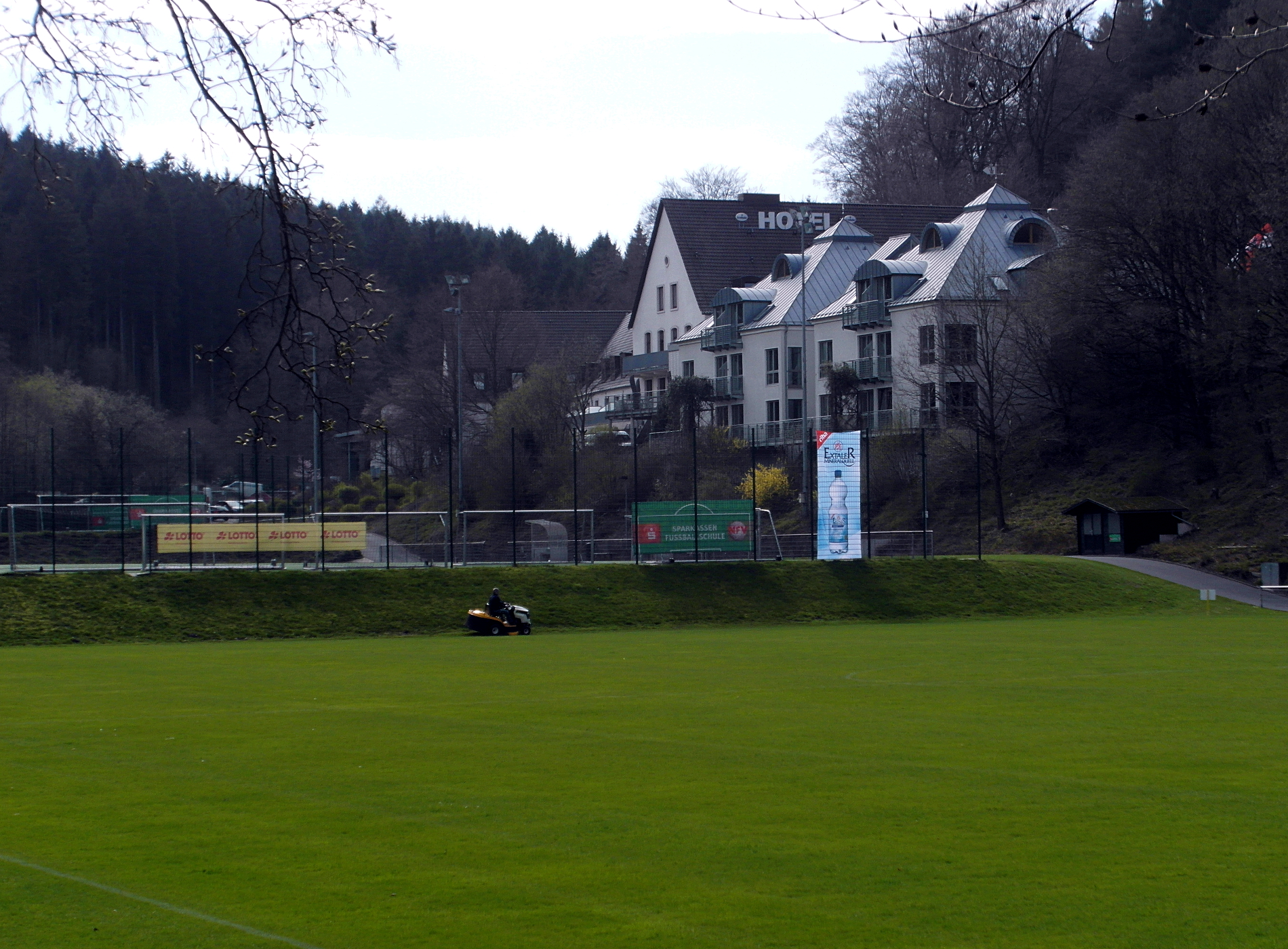 Rasenpflege auf einem Fußballplatz auf dem Gelände der NFV-Sportschule Barsinghausen. Im Hintergrund das Sporthotel Fuchsbachtal.